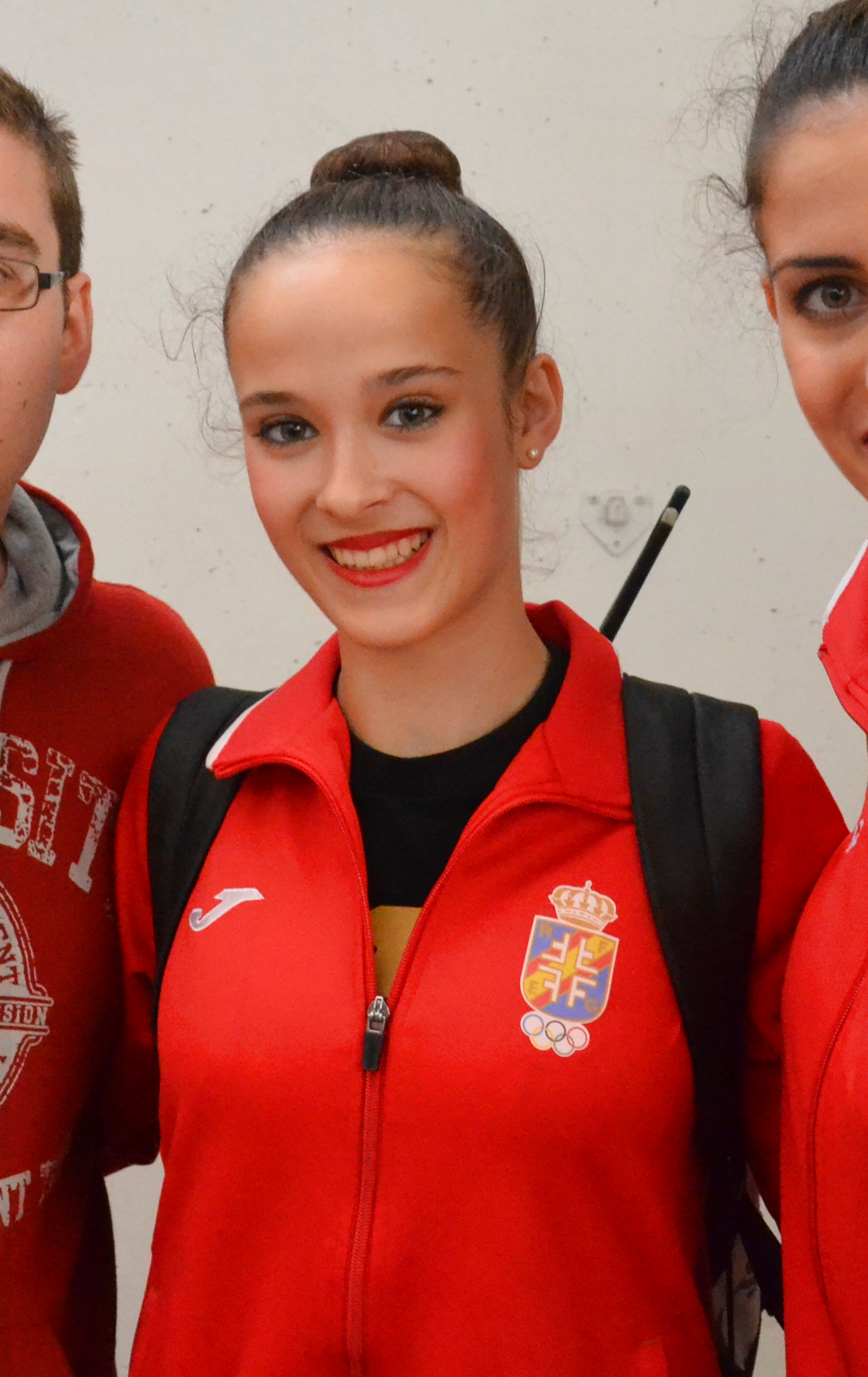 La gimnasta rítmica española Claudia Heredia en una exhibición en Vera (Almería) del conjunto español de gimnasia rítmica el 29 de marzo de 2014, su debut con el equipo sénior.